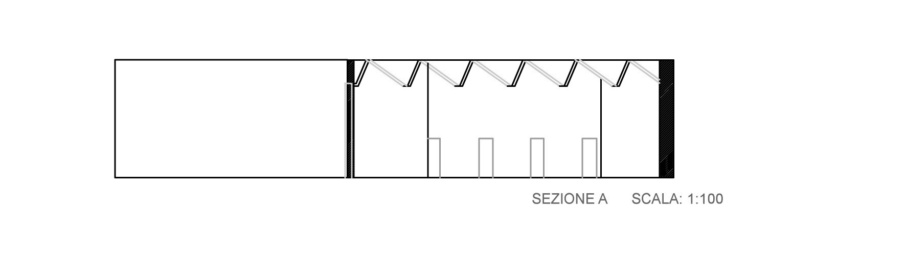 Sezione della mostra dell'industrial design presentata alla X edizione della Triennale di Milano